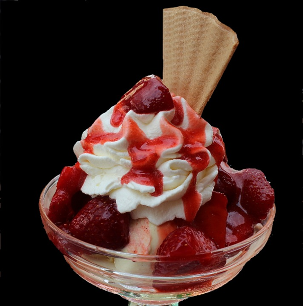 Alimento ultraprocessado com alto teor de açúcares, gordura e aditivos.